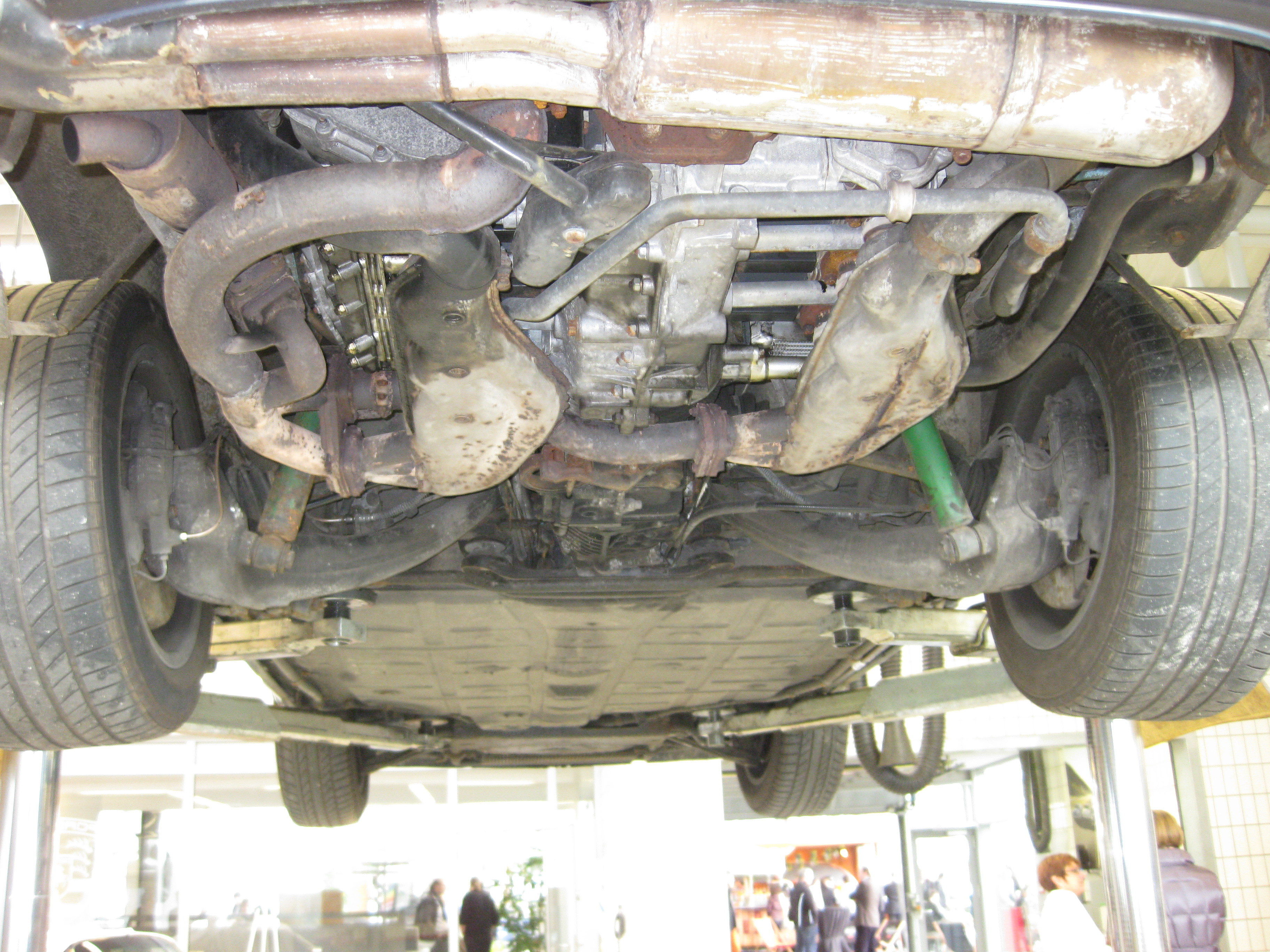 Porsche 911 - Motoransicht von unten